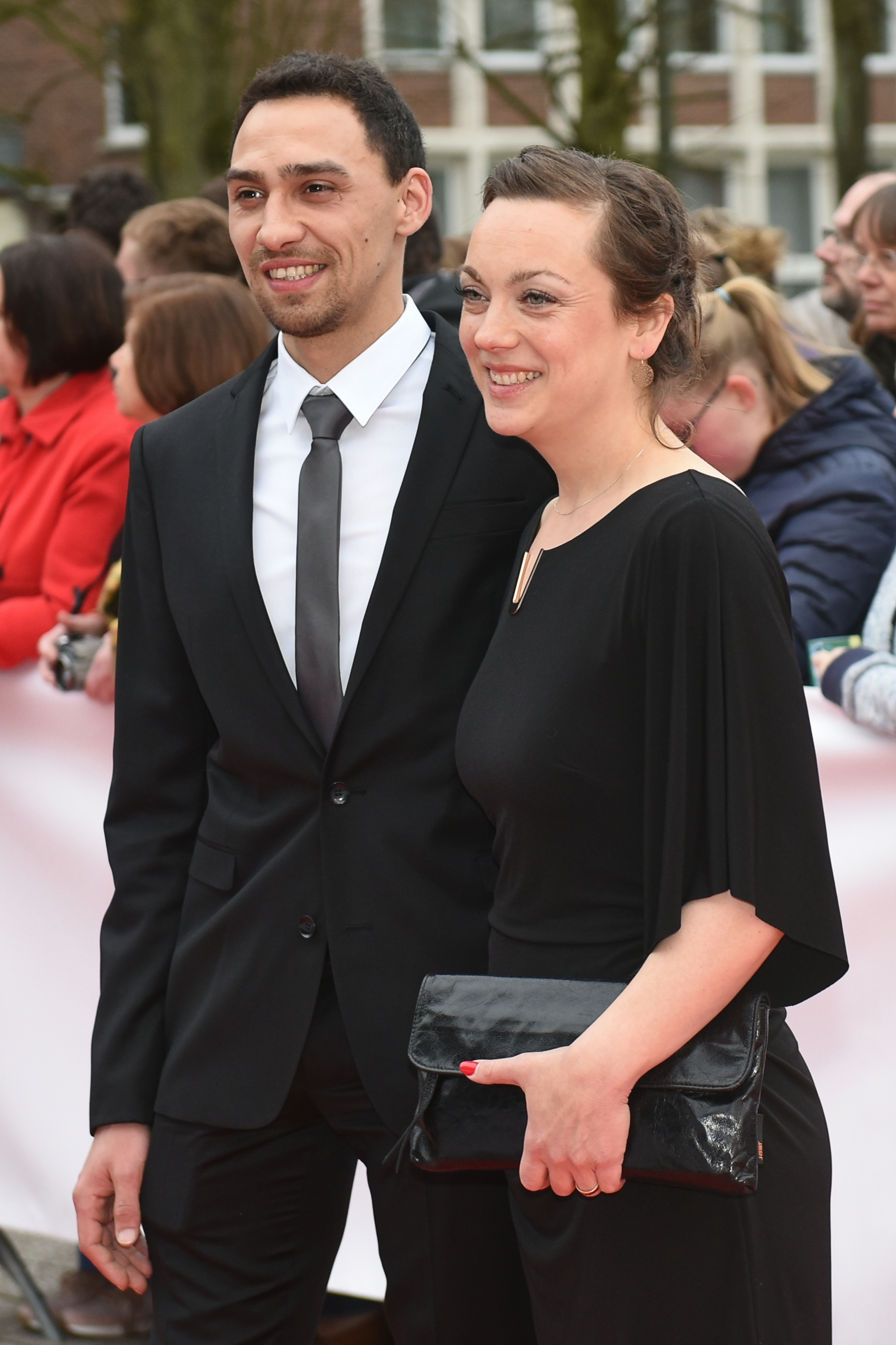 Verleihung des Grimme-Preises 2019.